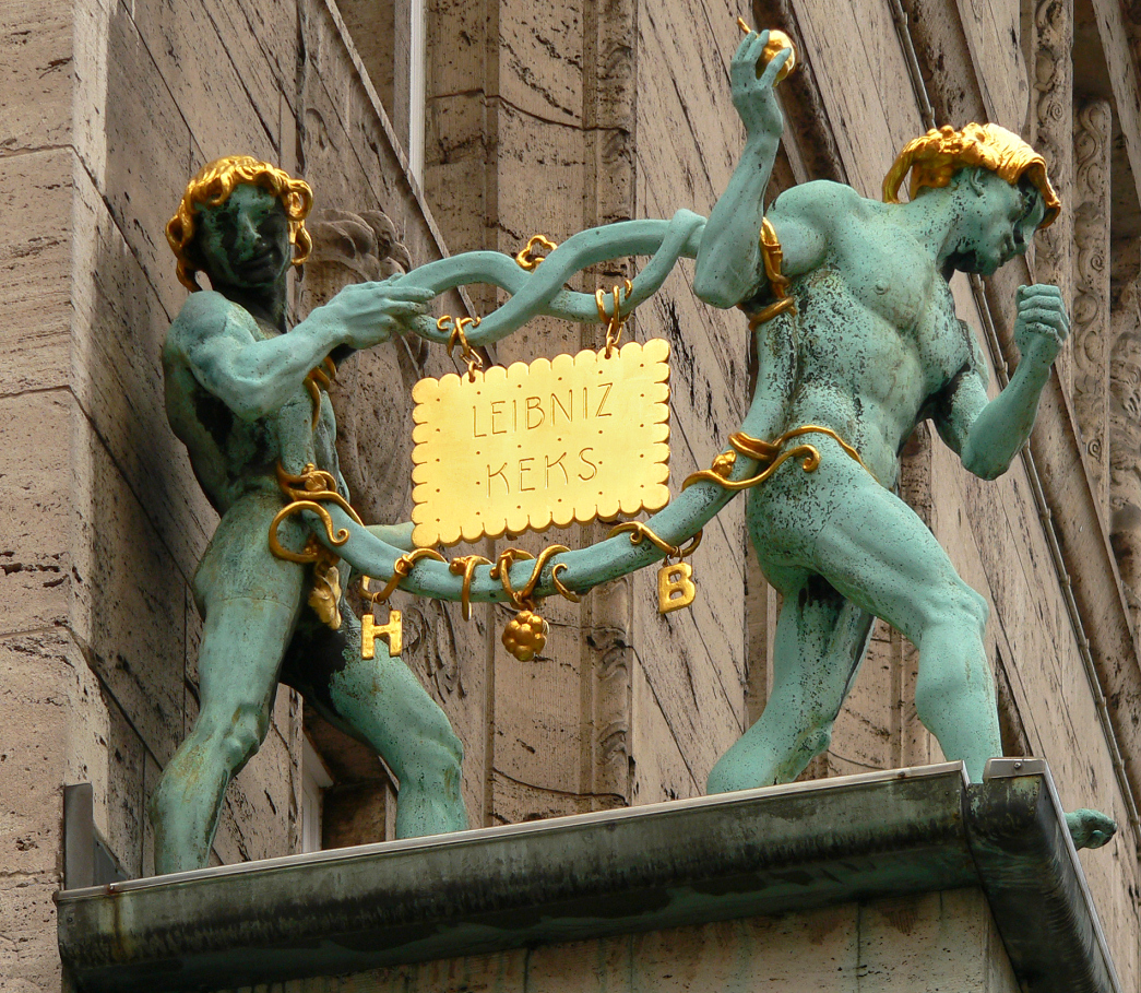 Goldener Leibnizkeks nach dem Wiederaufhängen nach dem Diebstahl, Brezelmänner (Hannover)